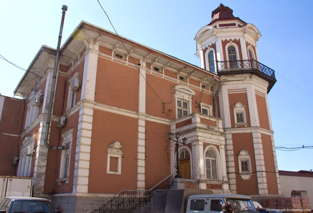 Дом, в котором жил Альфред фон Вакано. В дальнейшем в этом здании будет музей Жигулевского пивзавод